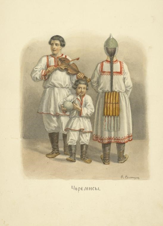 Одежда черемисов (марийцев). Акварель.